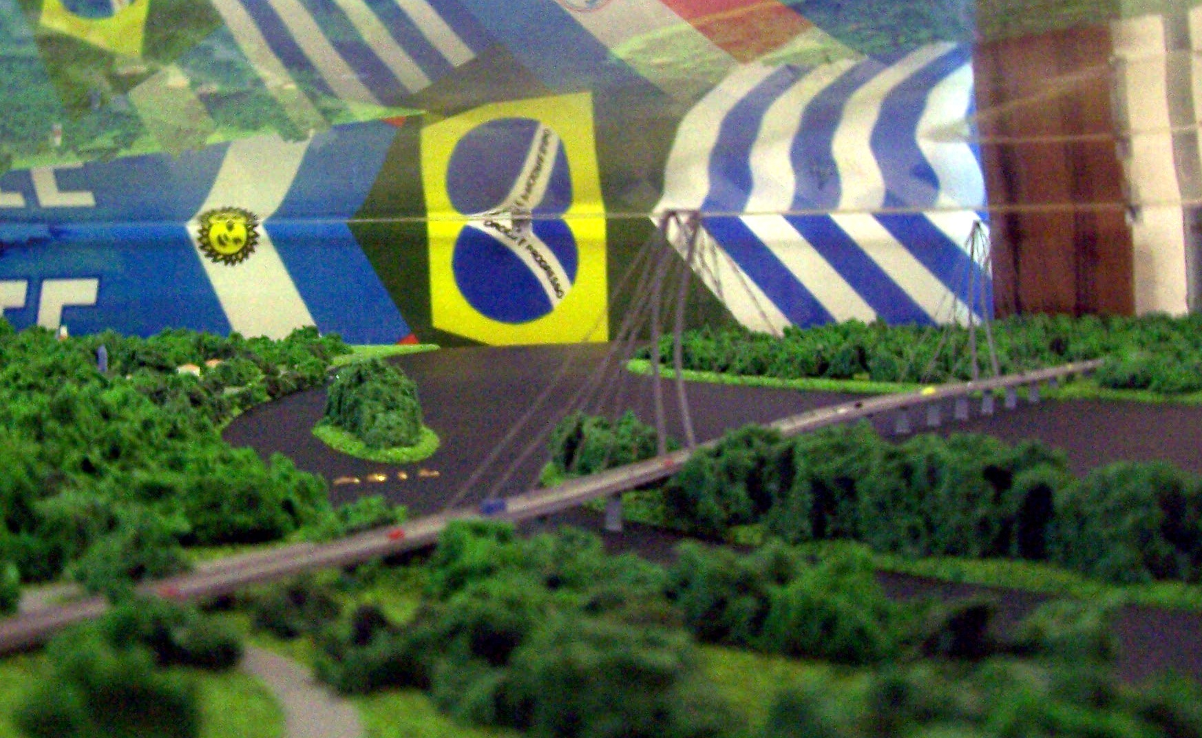 Maqueta del Puente Internacional Alba Posse - Porto Mauá, que conectara a la provincia argentina de Misiones con el estado brasileño de Rio Grande do Sul.